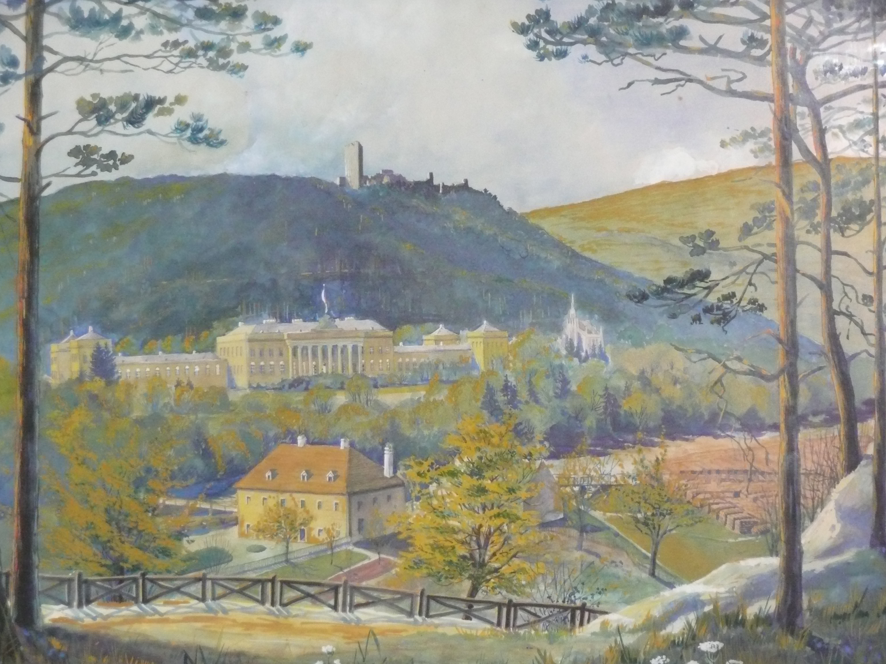 Aquarell von Schloss Weilburg bei Baden, im Hintergrund der Rauheneckkogel mit der Burgruine Rauheneck